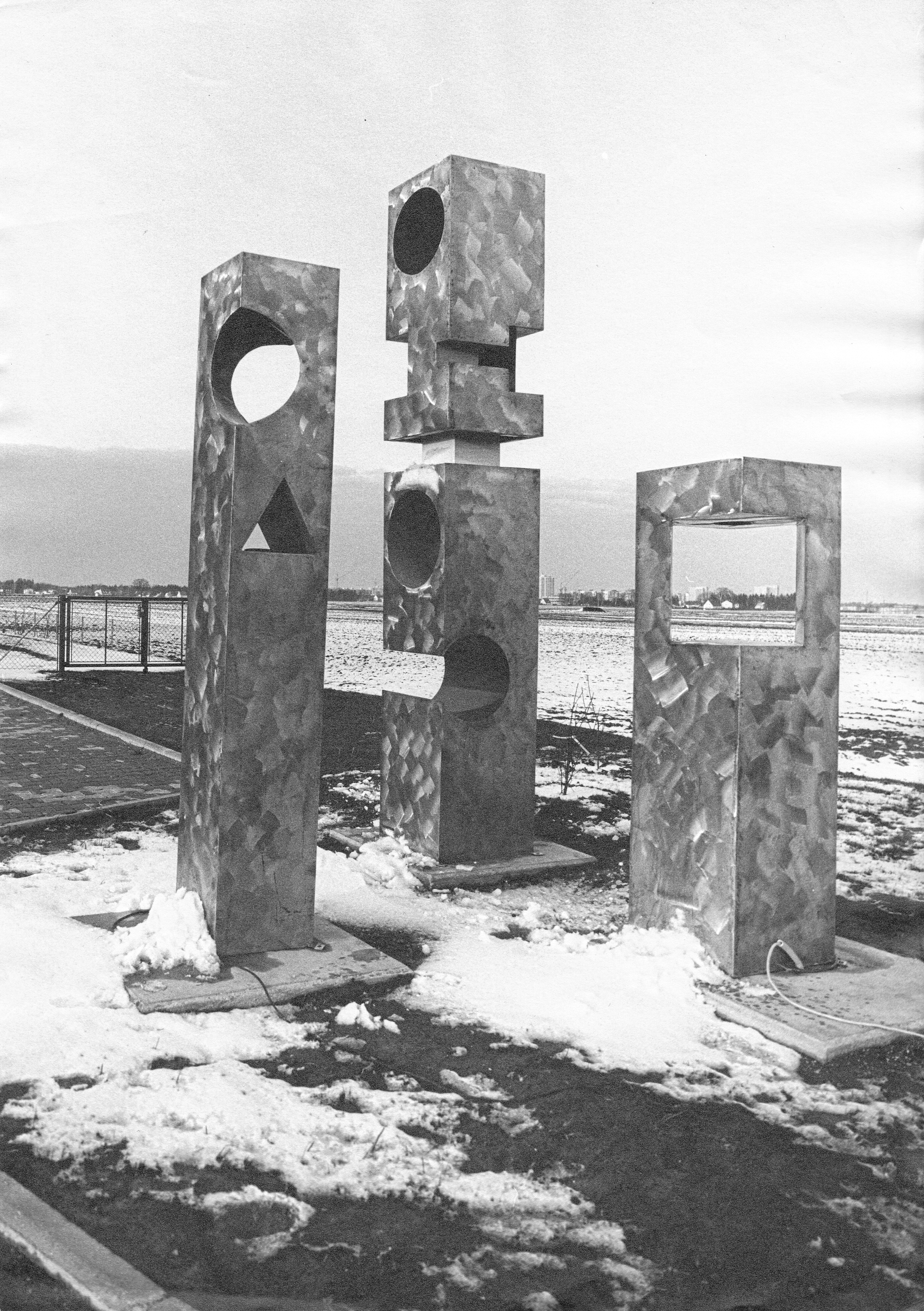 Lichtplastik Puchheim